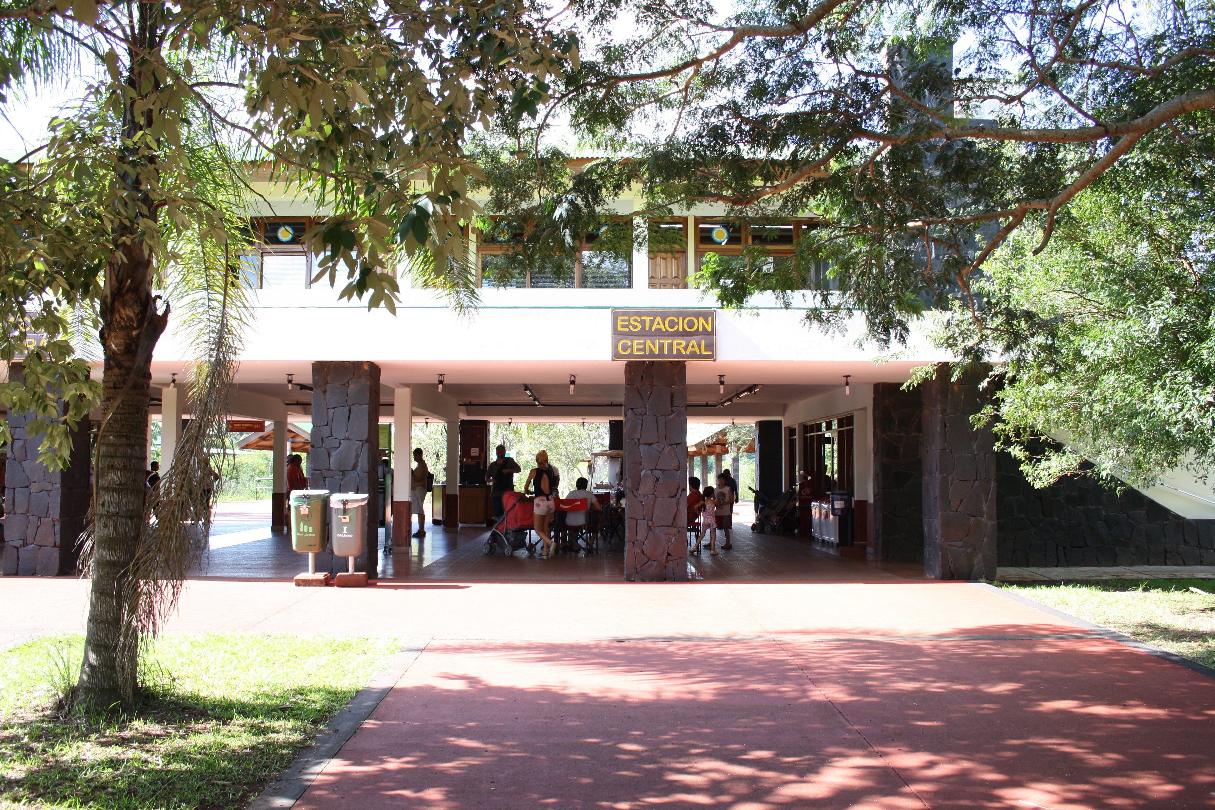 Entrada a la Estación Central del Tren Ecológico de la Selva